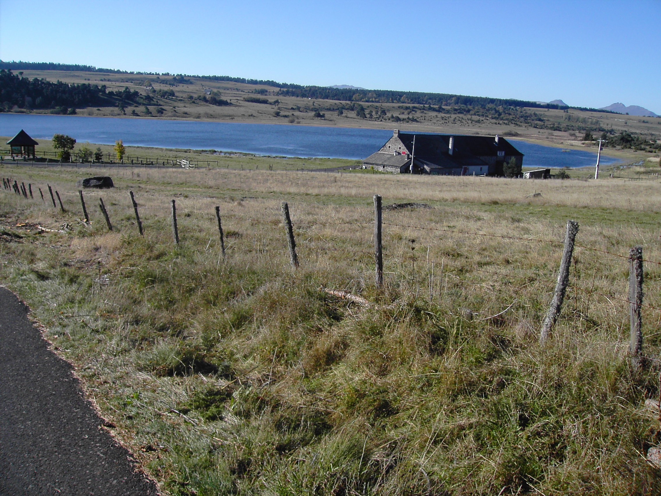 le lac du Pêcher, commune de Chavagnac (Cantal).